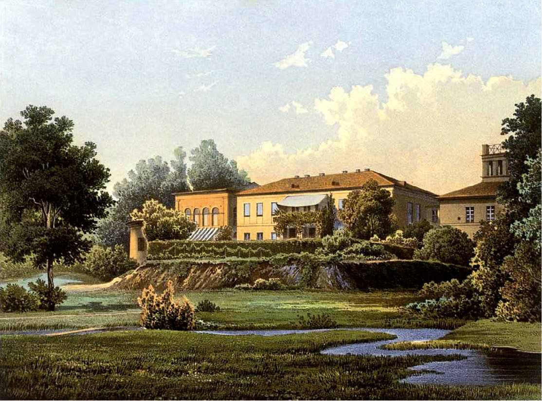 Schloss Reddentin, Kreis Schlawe, Provinz Pommern